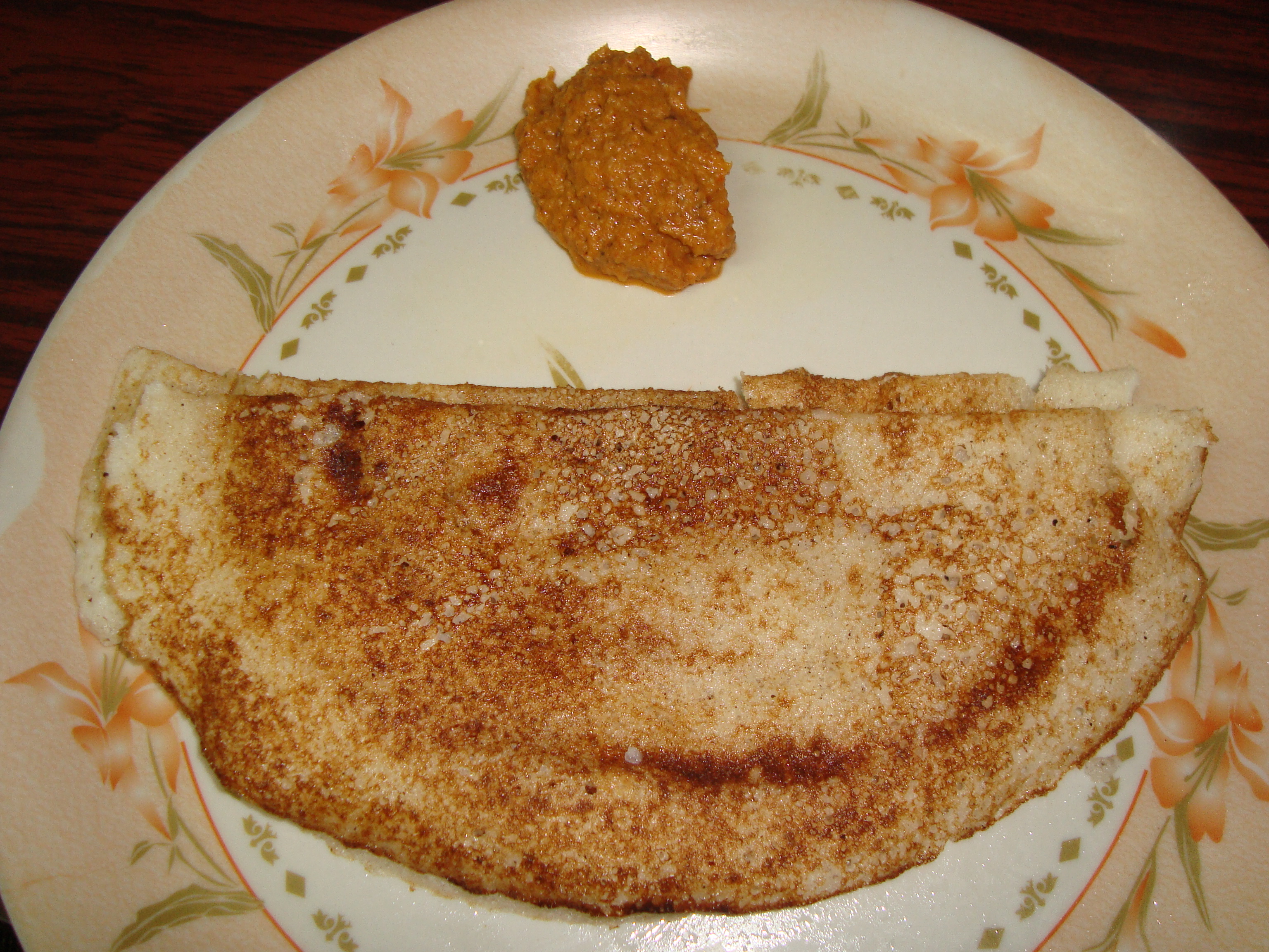 ദോശ